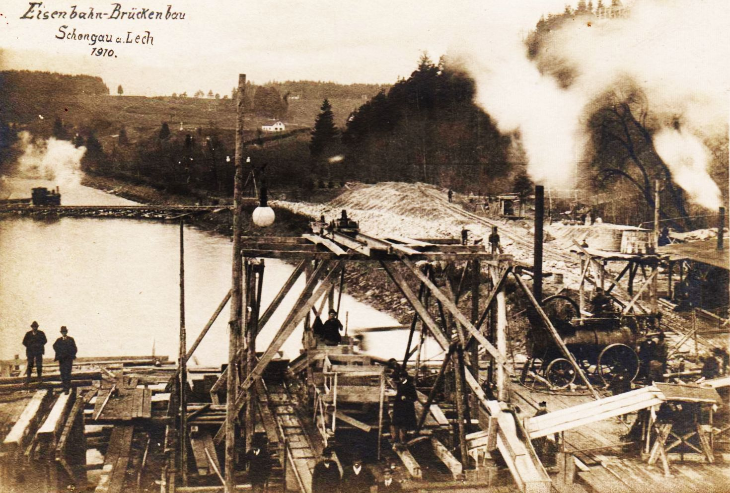 Alte Ansichtskarten: Bau der Eisenbahnbrücke in Schongau 1910